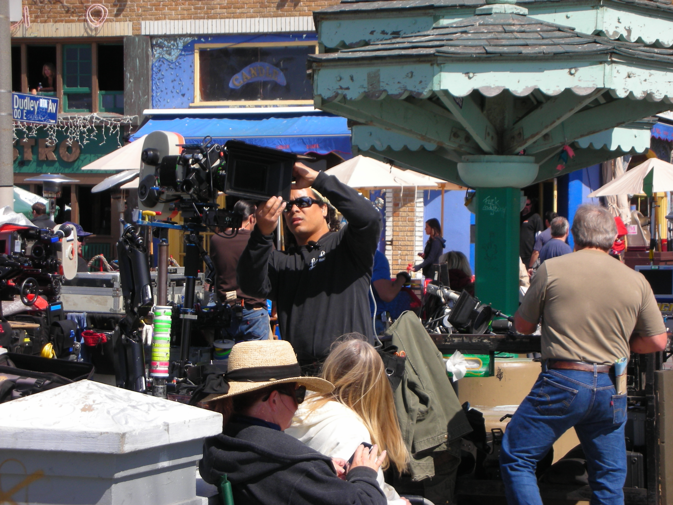 NCIS Filming